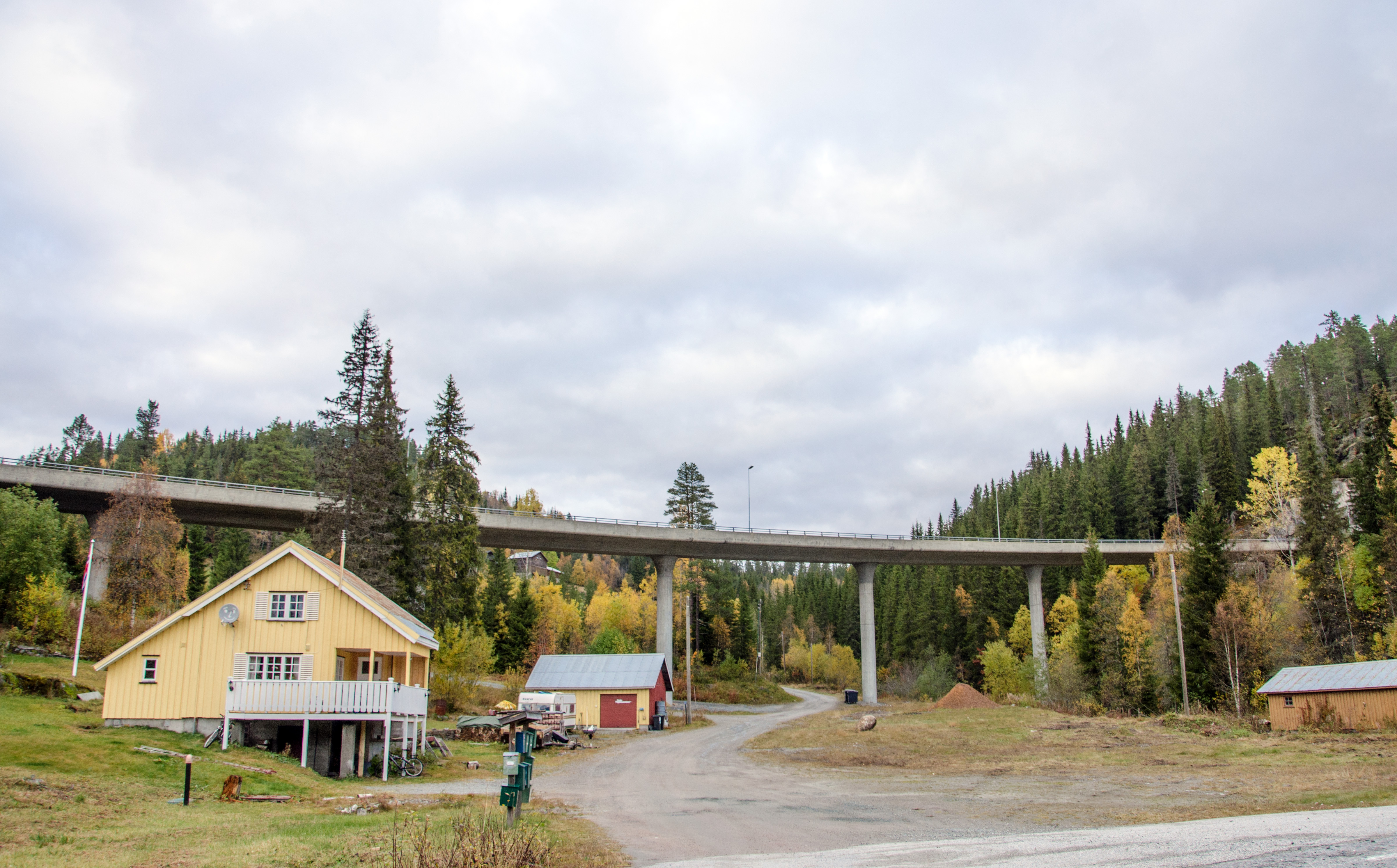 Mostøylbakken bru, Europavei 134